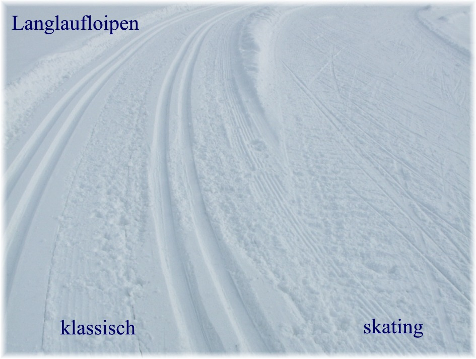 Langlaufloipen